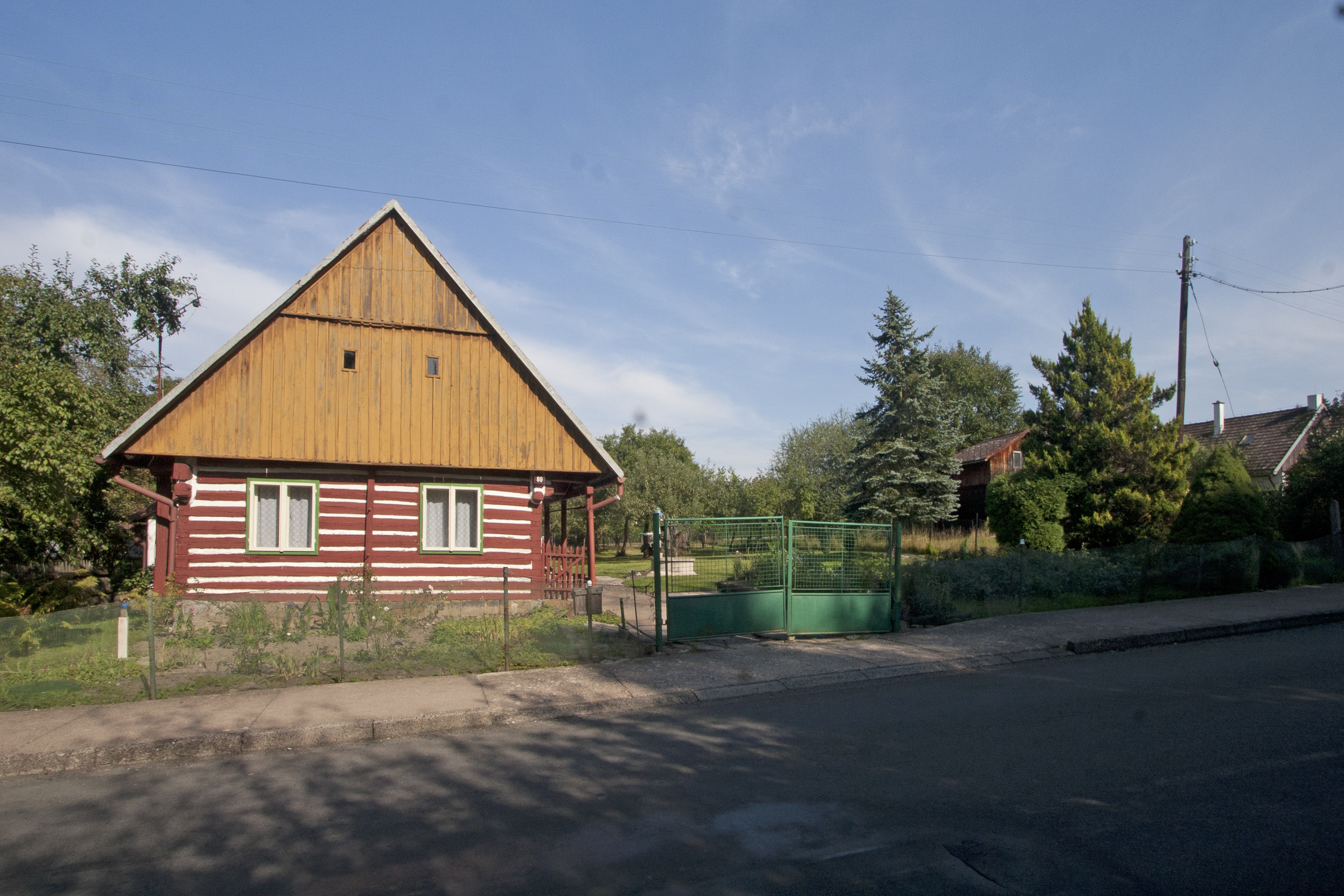 Lukavec u Hořic čp. 89